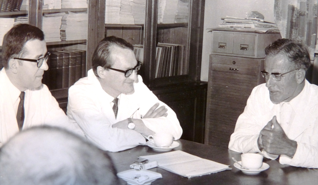 Besprechung mit Prof. Dr. Fred Kubli (1930-1987, war später Kliniksdirektor der Universitätsfrauenklinik in Heidelberg) und der Kliniksdirektor Prof. Dr. Otto Käser (später Kliniksdirektor der Universitätsfrauenklinik in Basel)